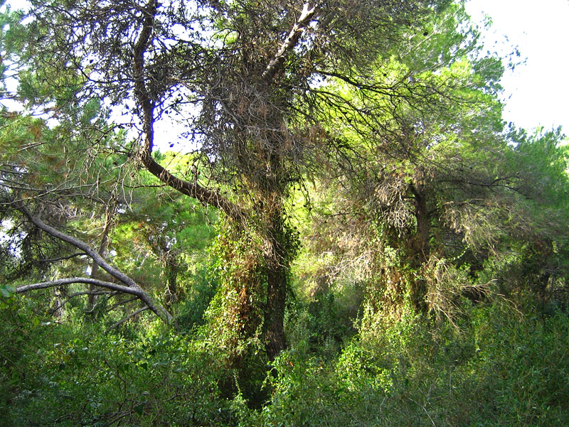 la Devesa del Saler, a l'Albufera de València (Ciutat de València), País Valencià.